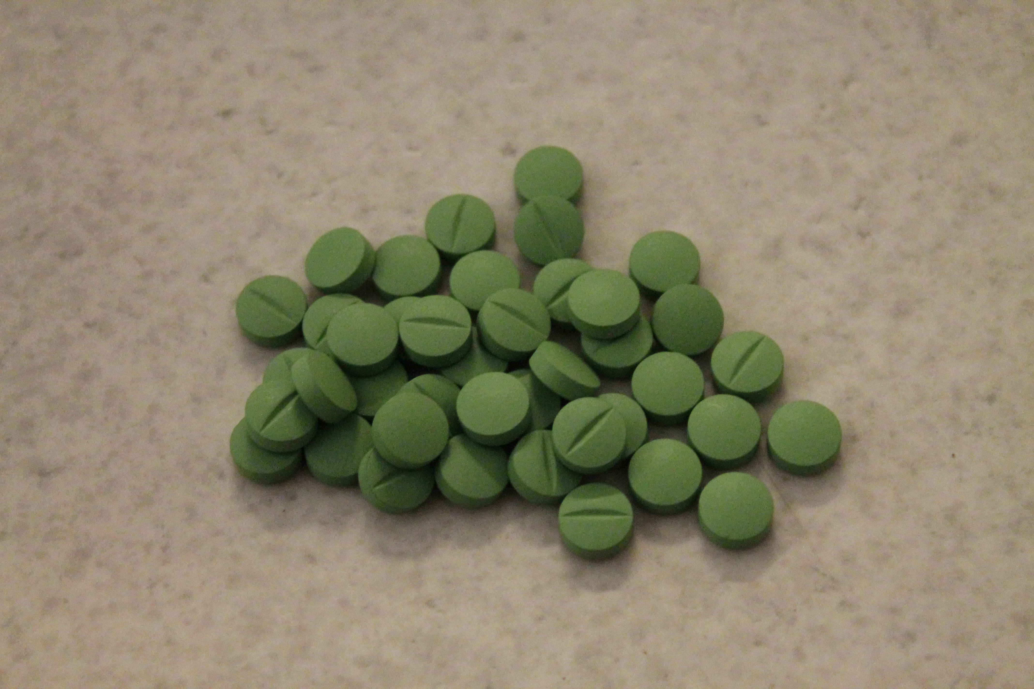 Risolid 25mg tabletteja (klooridiatsepoksidi)